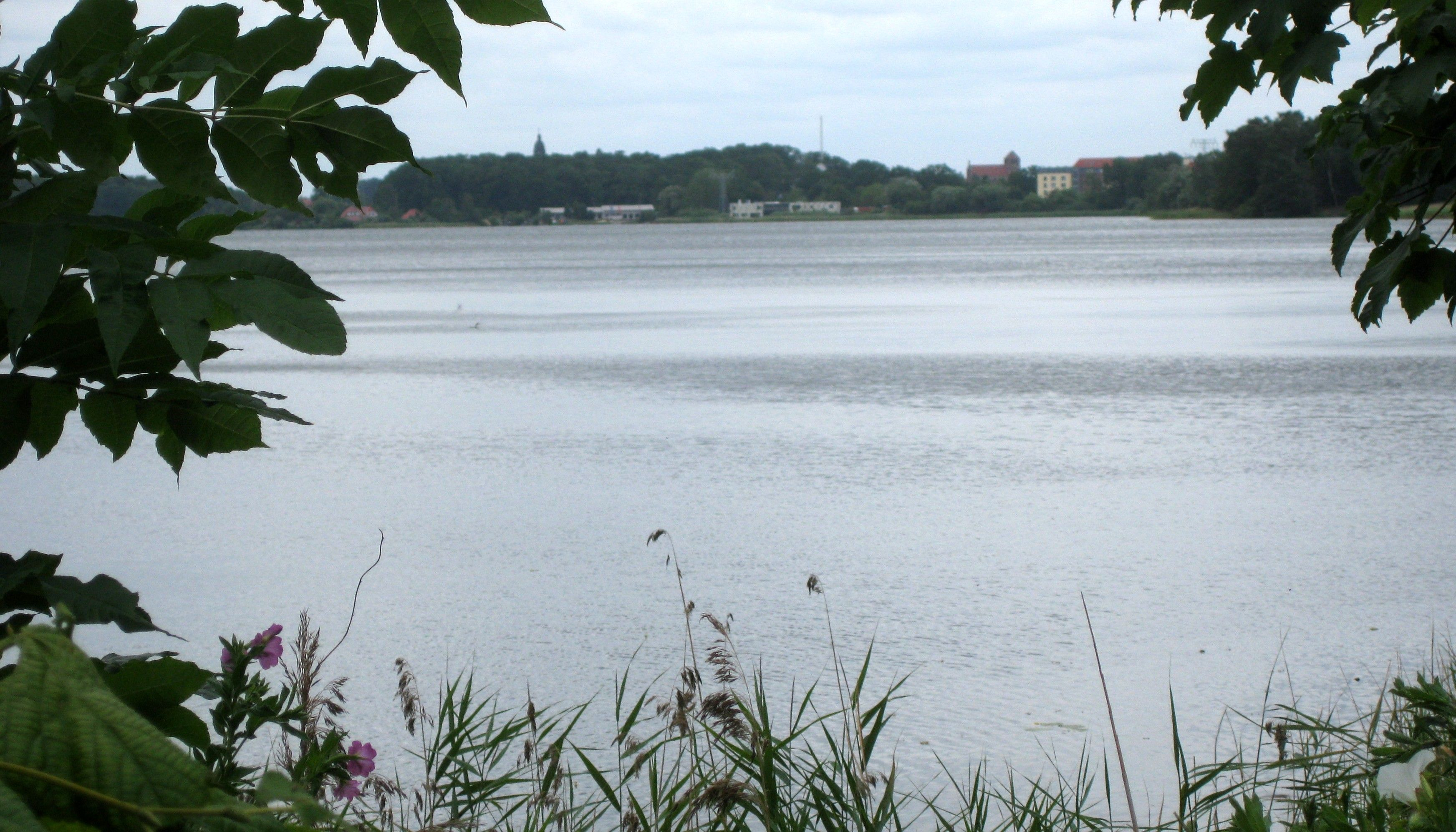 Blick von der Klinik Amsee auf den Tiefwarensee.